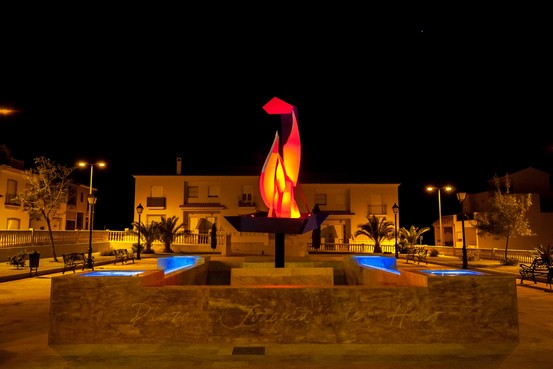 Joaquin de haro